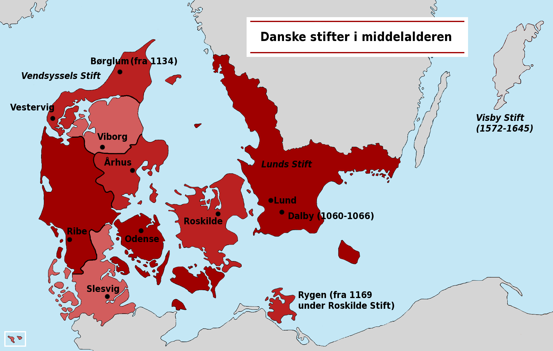 Danske stifter / bispedømmer i middelalderen